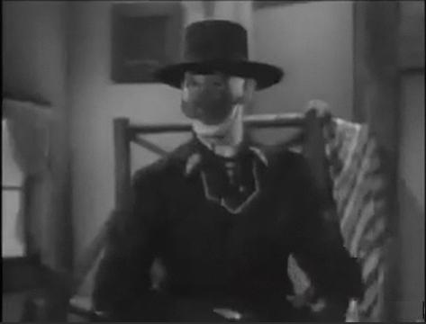 Screenshot da me realizzato dal trailer ufficiale del film Zorro's Fighting Legion (1939), disponibile sul sito [1]